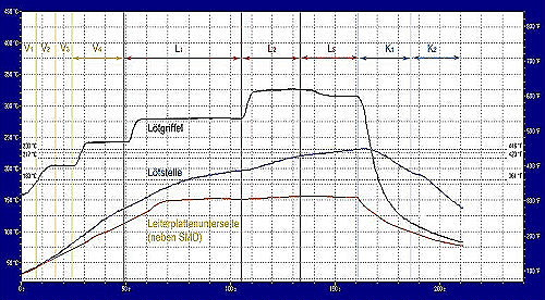 Lötprofil